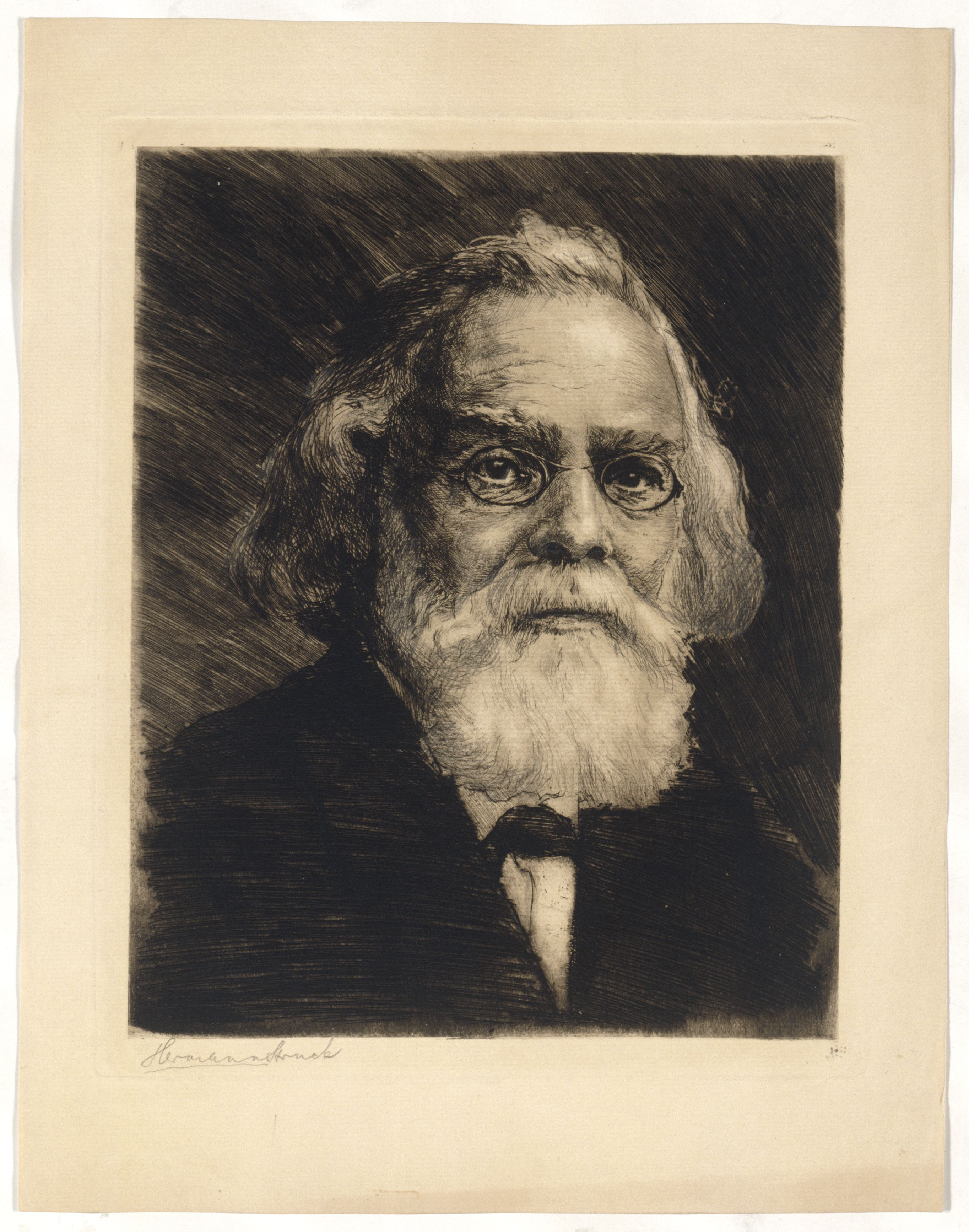 Artwork by Hermann Struck Dargestellte Person: Steinthal, Heymann (1823 - 1899), DNB-Link Datierung Display: ca. 1903 Objektart: Radierung Schlagworte Inhalt /Geografie: Mann, Porträt, Brille, alter Mensch Schlagworte Kontext: Philosoph